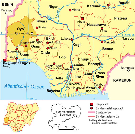 Politische Karte Nigerias (Bundesstaat Oyo hervorgehoben)